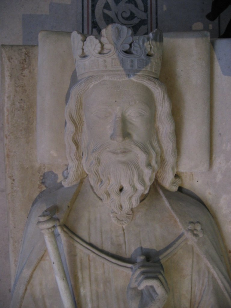 Sépulpture de Clovis 1er à la Cathédrale de Saint-Denis près de Paris